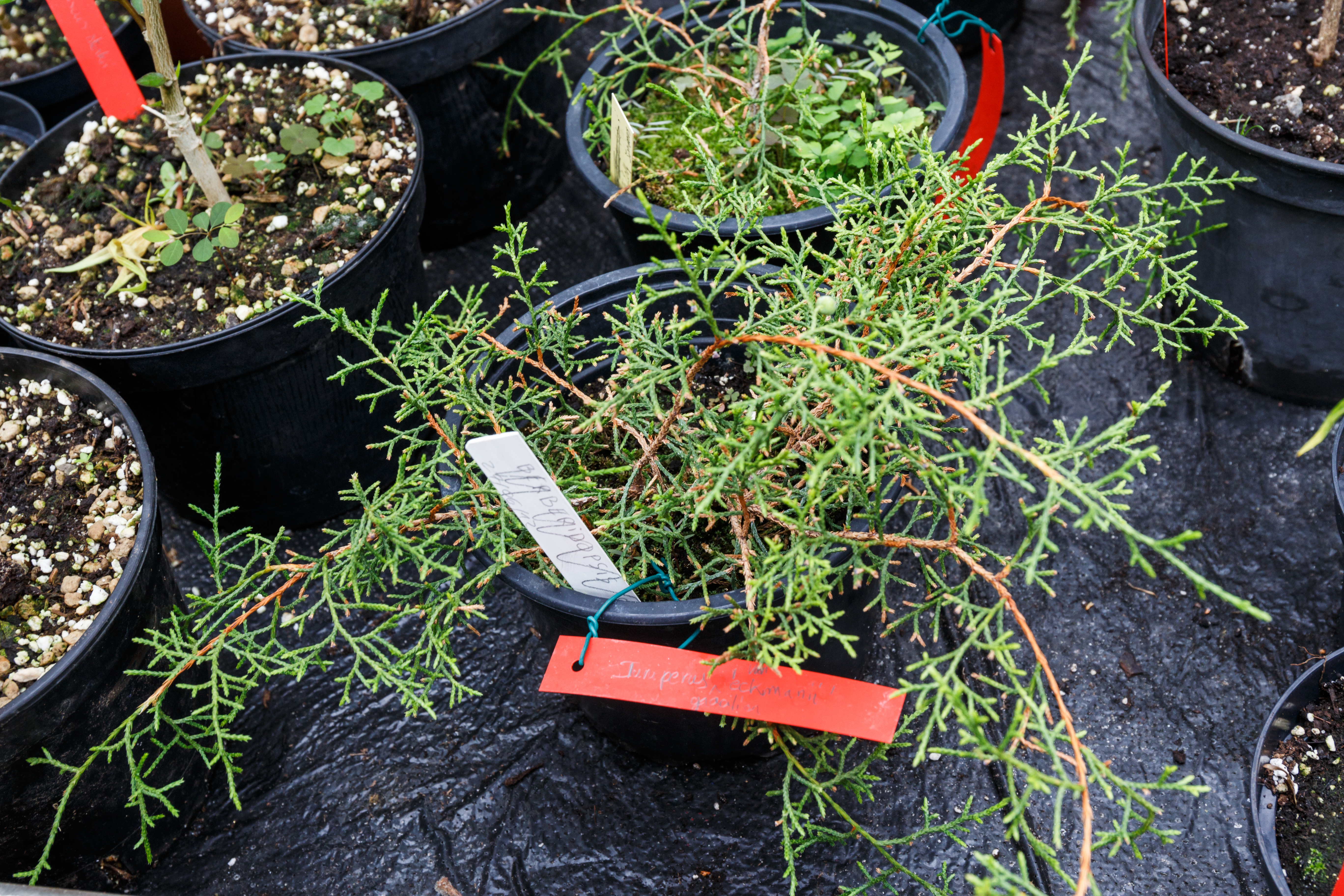 Genévrier d'Ekman (Juniperus gracilior var.ekmanii) Conservatoire botanique national de Brest Native nameConservatoire botanique national de BrestLocationBrest, FranceCoordinates48° 24′ 10″ N, 4° 26′ 54″ W Established1975: established, 1978: opened to publicWebsite control : Q2994486